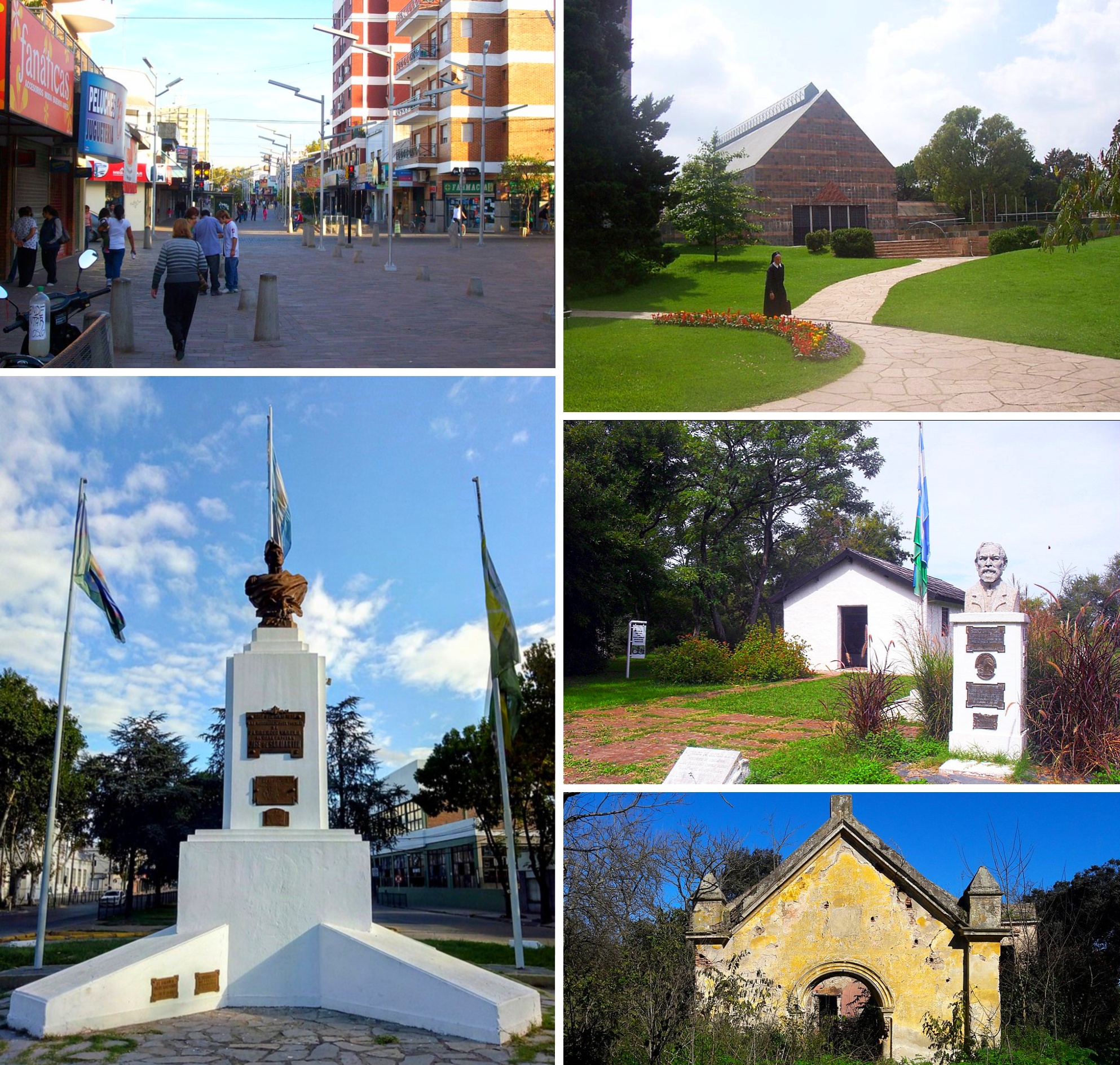 Montaje de imágenes de Florencio Varela (Argentina).